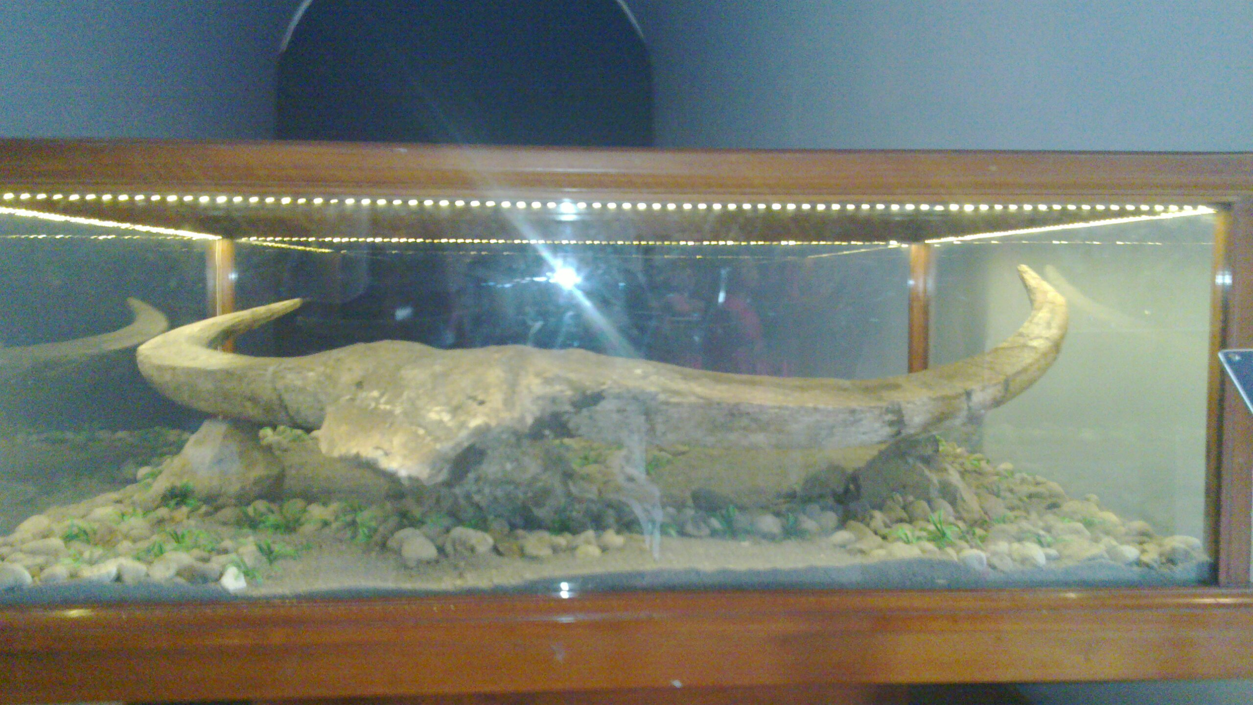 சஙீரானிற் காணப்படும் பல மில்லியன் ஆண்டுகள் பழைமையான எருமையொன்றின் மண்டையோடும் கொம்புகளும்